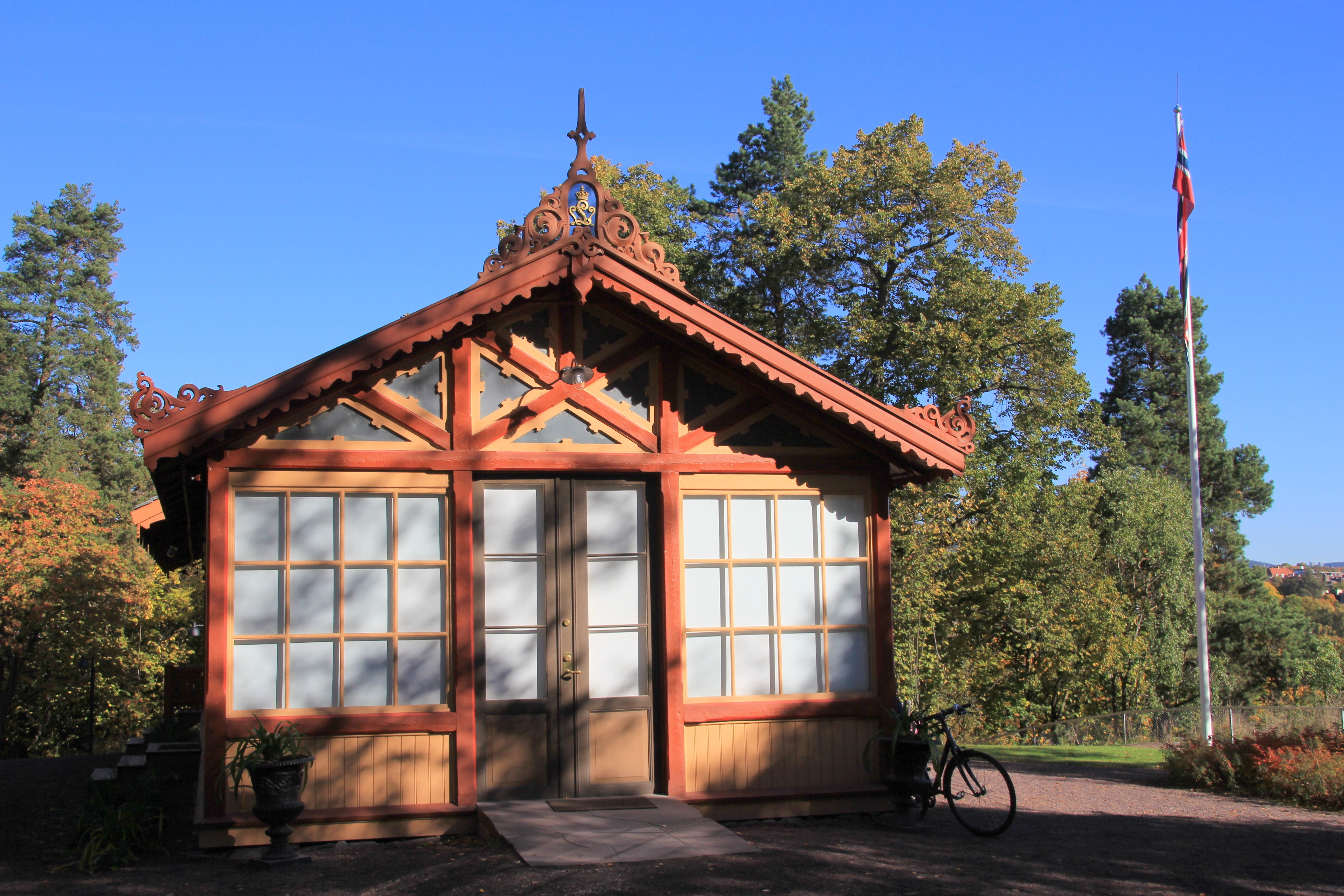 Seterhytten på Dronningberget, Bygdøy kongsgård